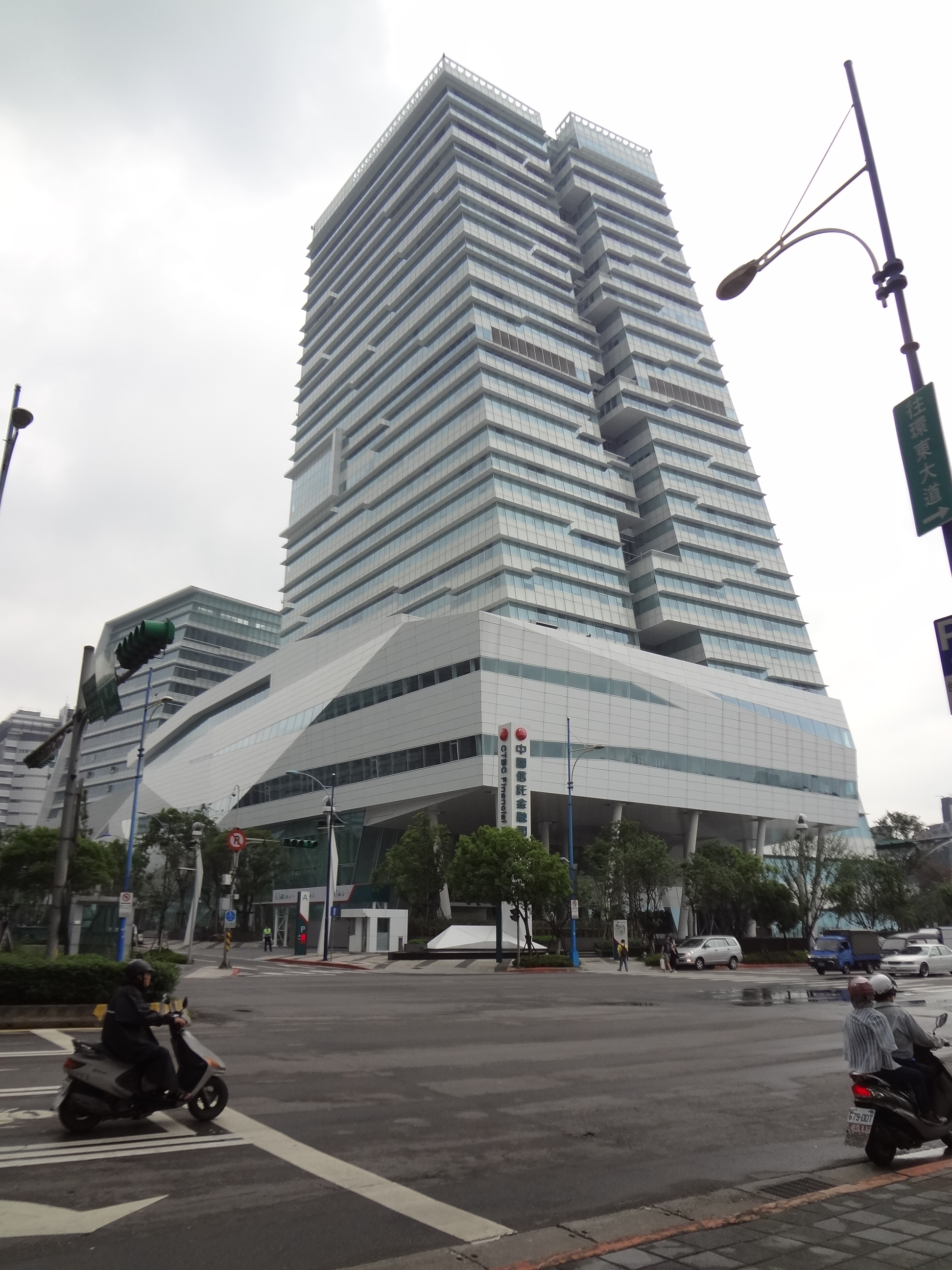 中國信託金融園區，位於臺灣臺北市南港區經貿二路。